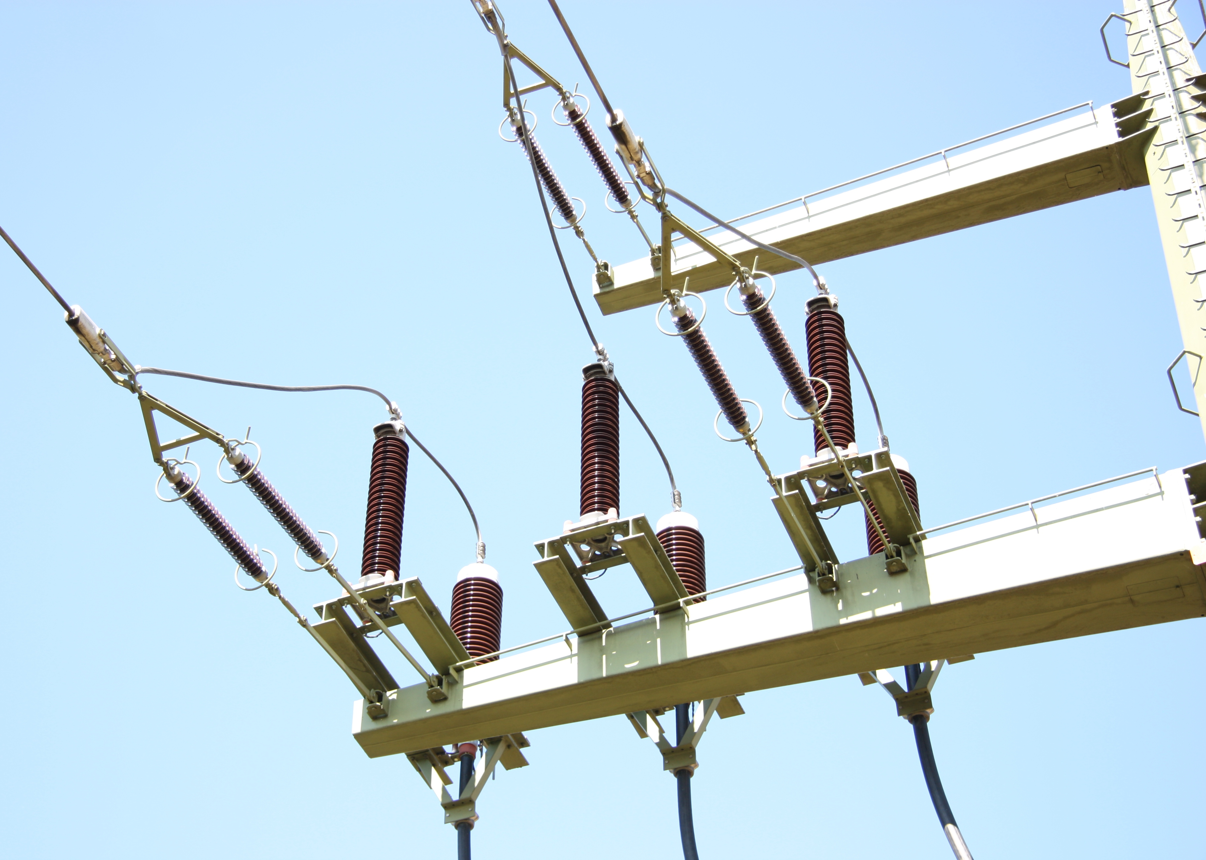 Isolatoren am Endmast in Leinfelden-Echterdingen bei Filderstadt-Bernhausen, neben der Bundesstraße 27.